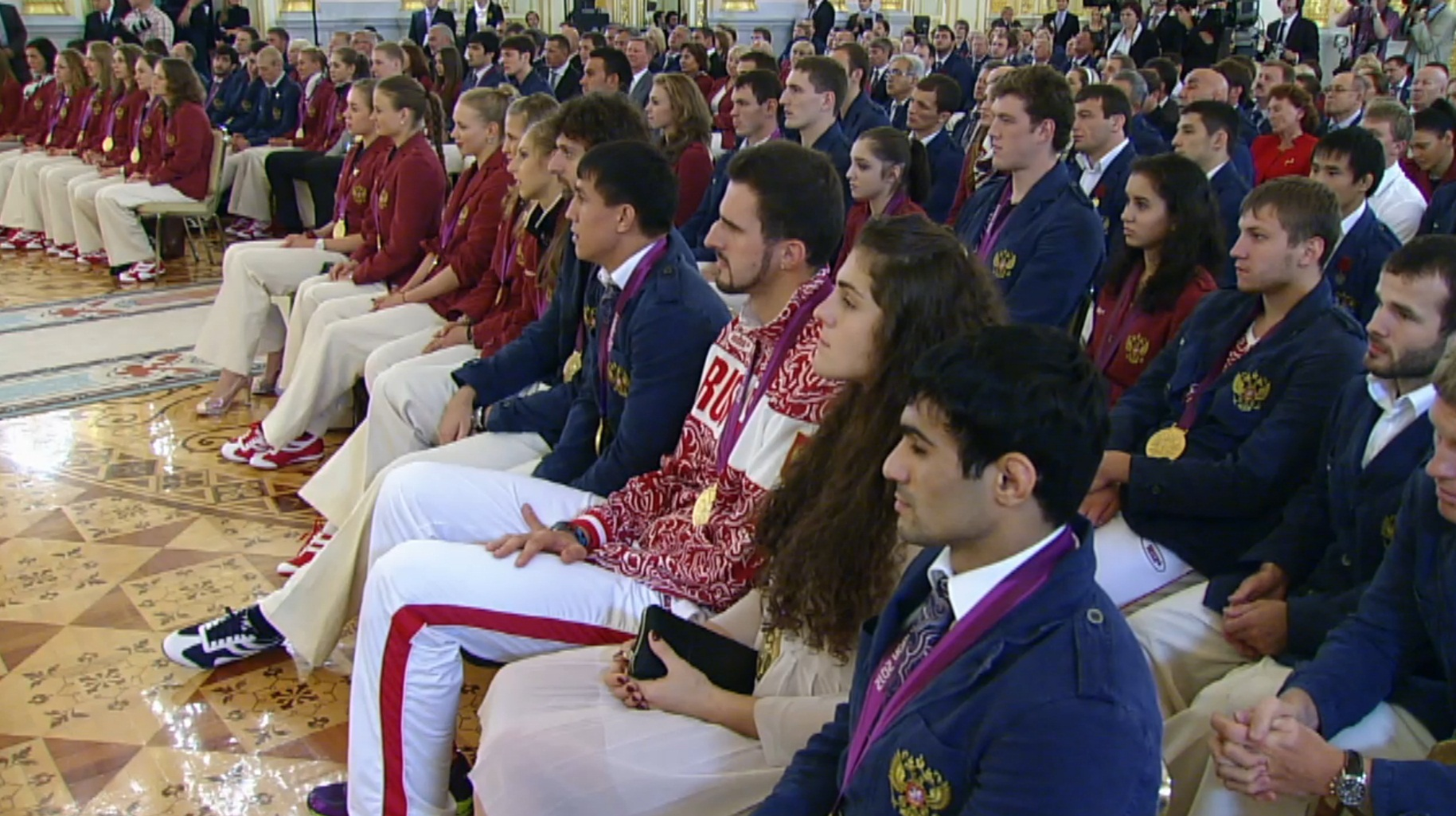 Встреча победителей и призёров Олимпийских игр 2012 года с президентом России на вручении государственных наград 16 августа 2012